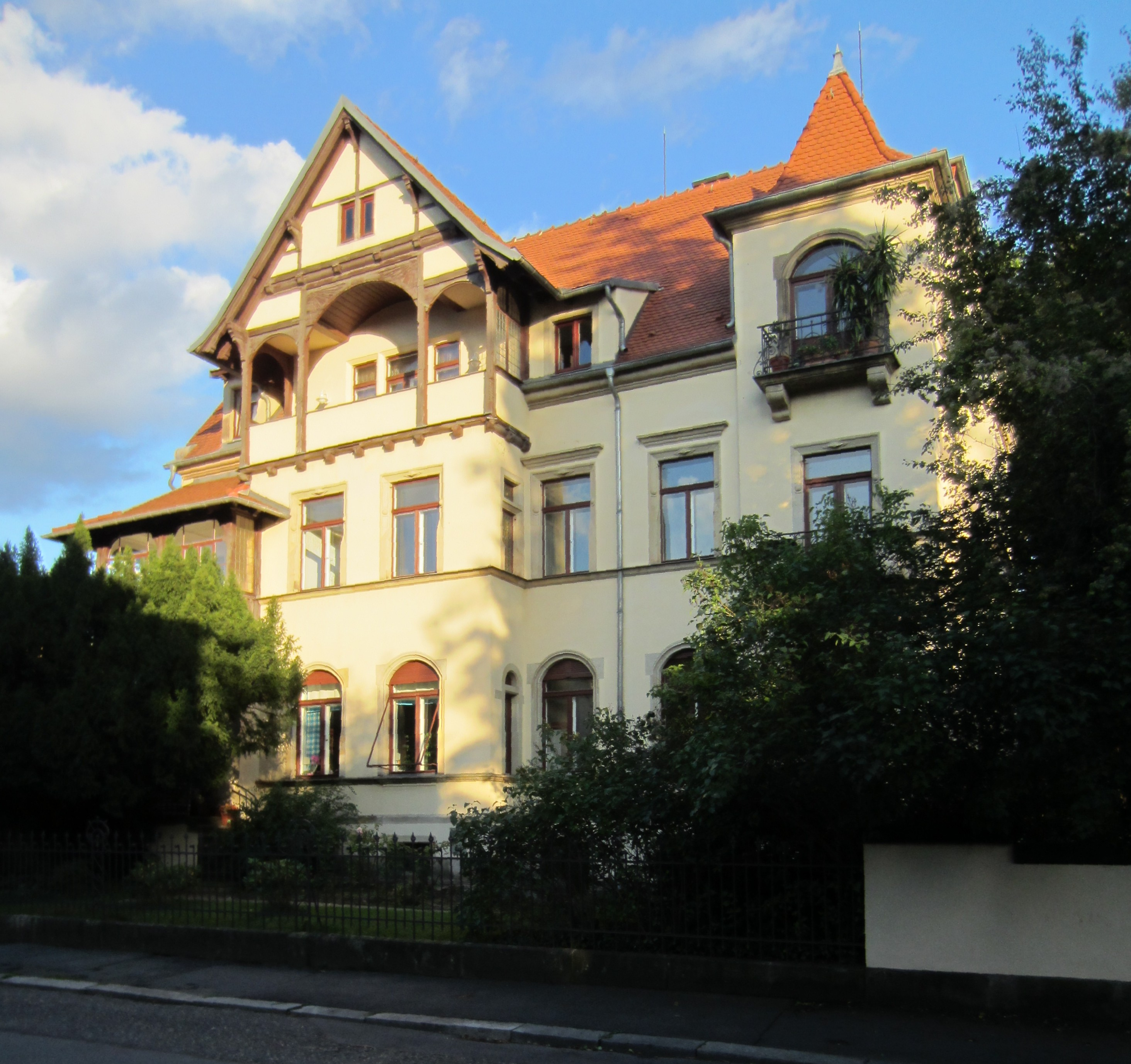 Denkmalgeschütztes Wohnhaus in Blasewitz (Dresden), Regerstraße 27